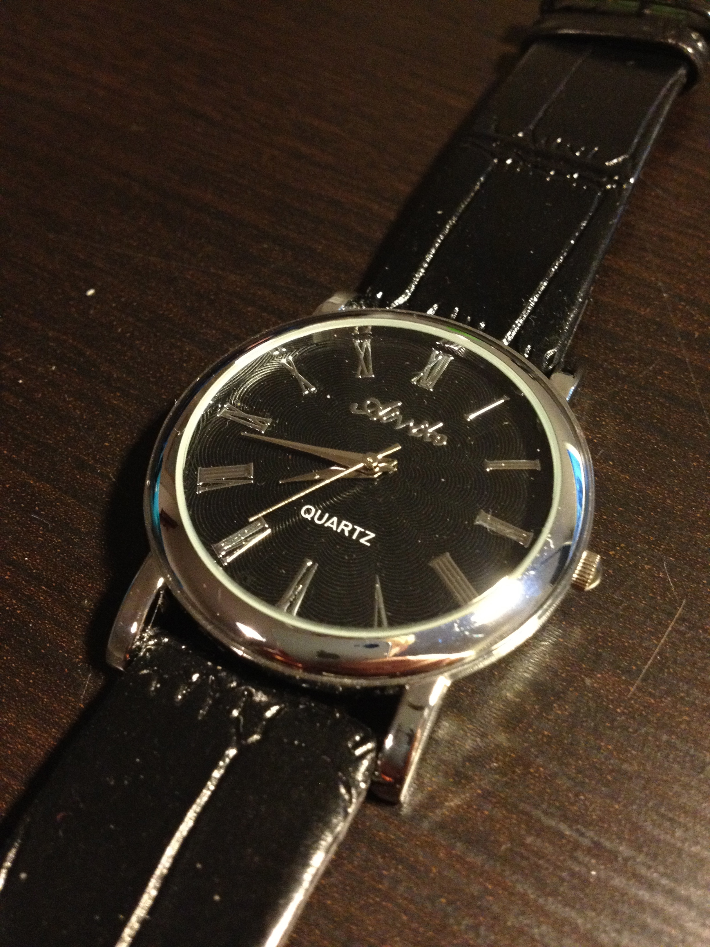 Ett exempel på en Aivike-klocka.